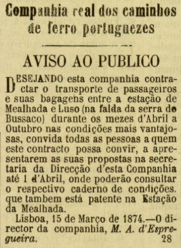 Anúncio da Companhia Real dos Caminhos de Ferro Portugueses, para a abertura de propostas para o transporte de passageiros e bagagens entre a estação de Mealhada e a povoação de Luso, na Serra do Buçaco. Esta imagem foi publicada no Diario Illustrado n.º 560, de 19 de Março de 1874, e digitalizada pela Biblioteca Nacional de Portugal.Interlingue: Tender notice of the Companhia Real dos Caminhos de Ferro Portugueses (Royal Company of the Portuguese Railways), for a transport service of passengers and luggage from the Mealhada Railway Station to the town of Luso, in the Buçaco mountain range. This image was published on the Diario Illustrado newspaper No. 560, of 19th March 1874, and scanned by the Biblioteca Nacional de Portugal.